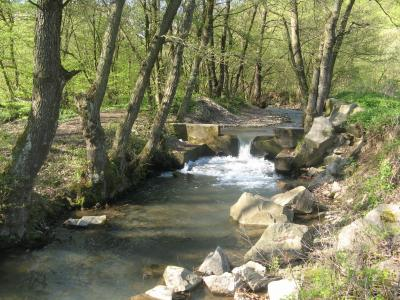 Potok Lomnička Juskova Voľa